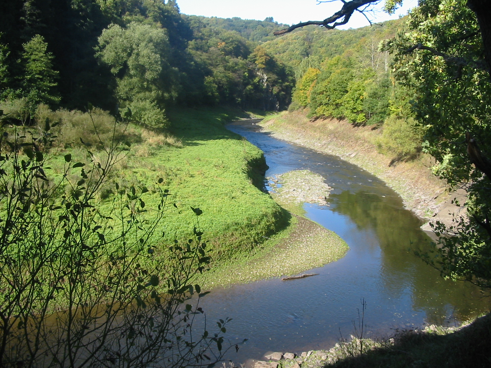 Gemünd, Northrhine-Westphalia; Urft landscape between Gemünd and Urftsee